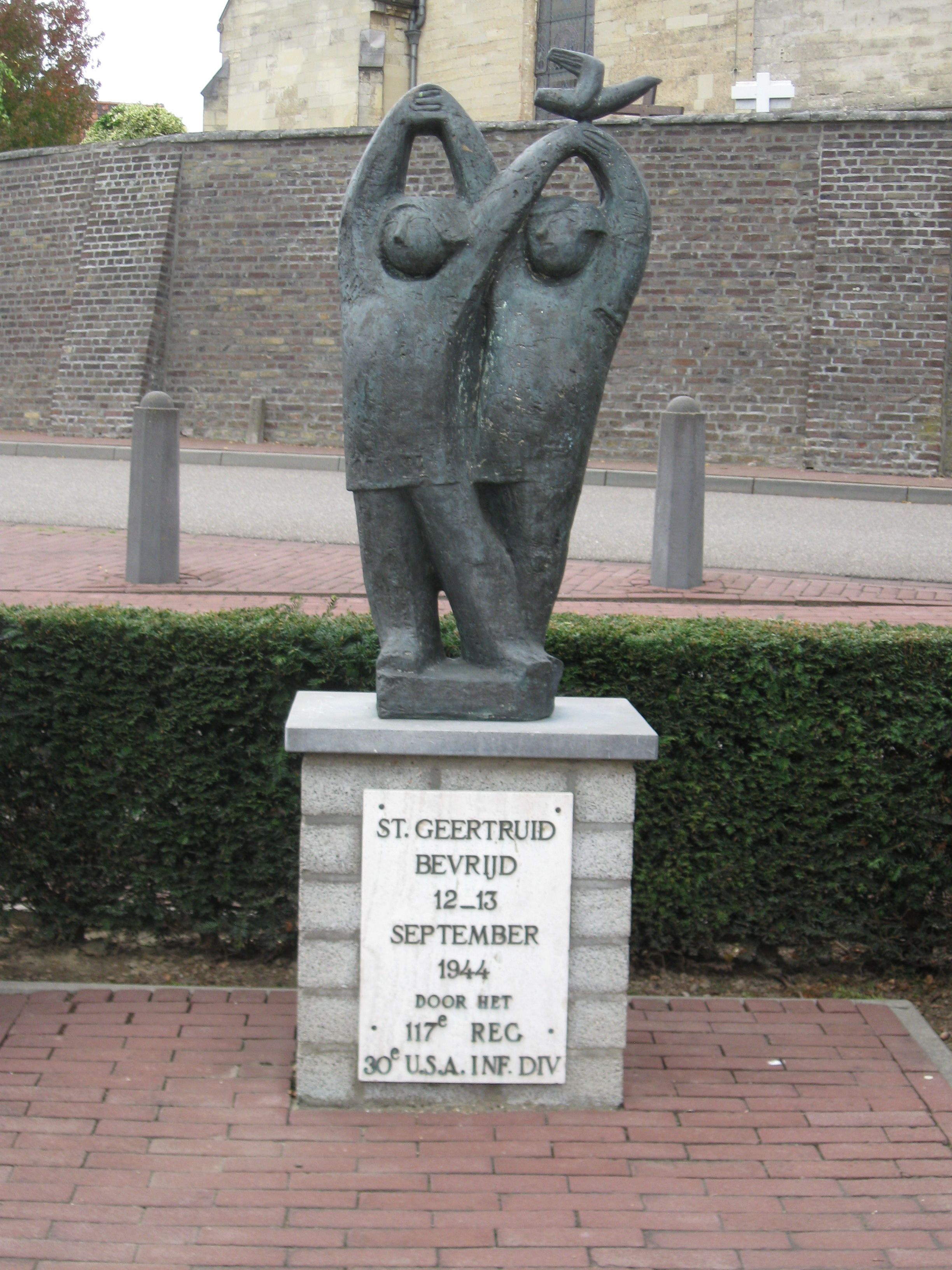 Sint Geertruid, bevrijdingsmonument